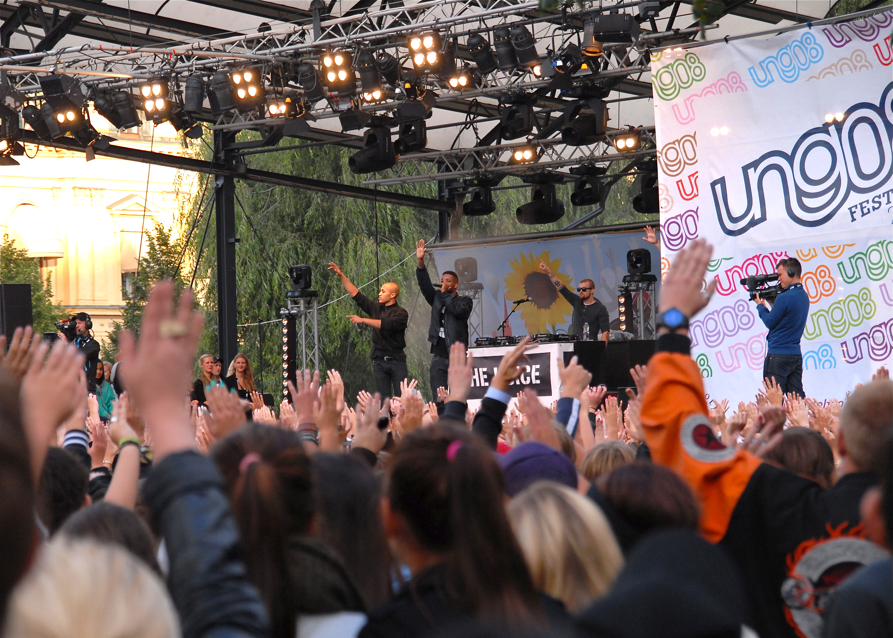 Ung08-festivalen i Kungsträdgården i Stockholm 20 augusti 2011.